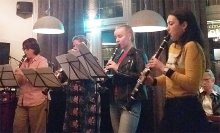 gelegenheids kwartet Kroonavond 2019